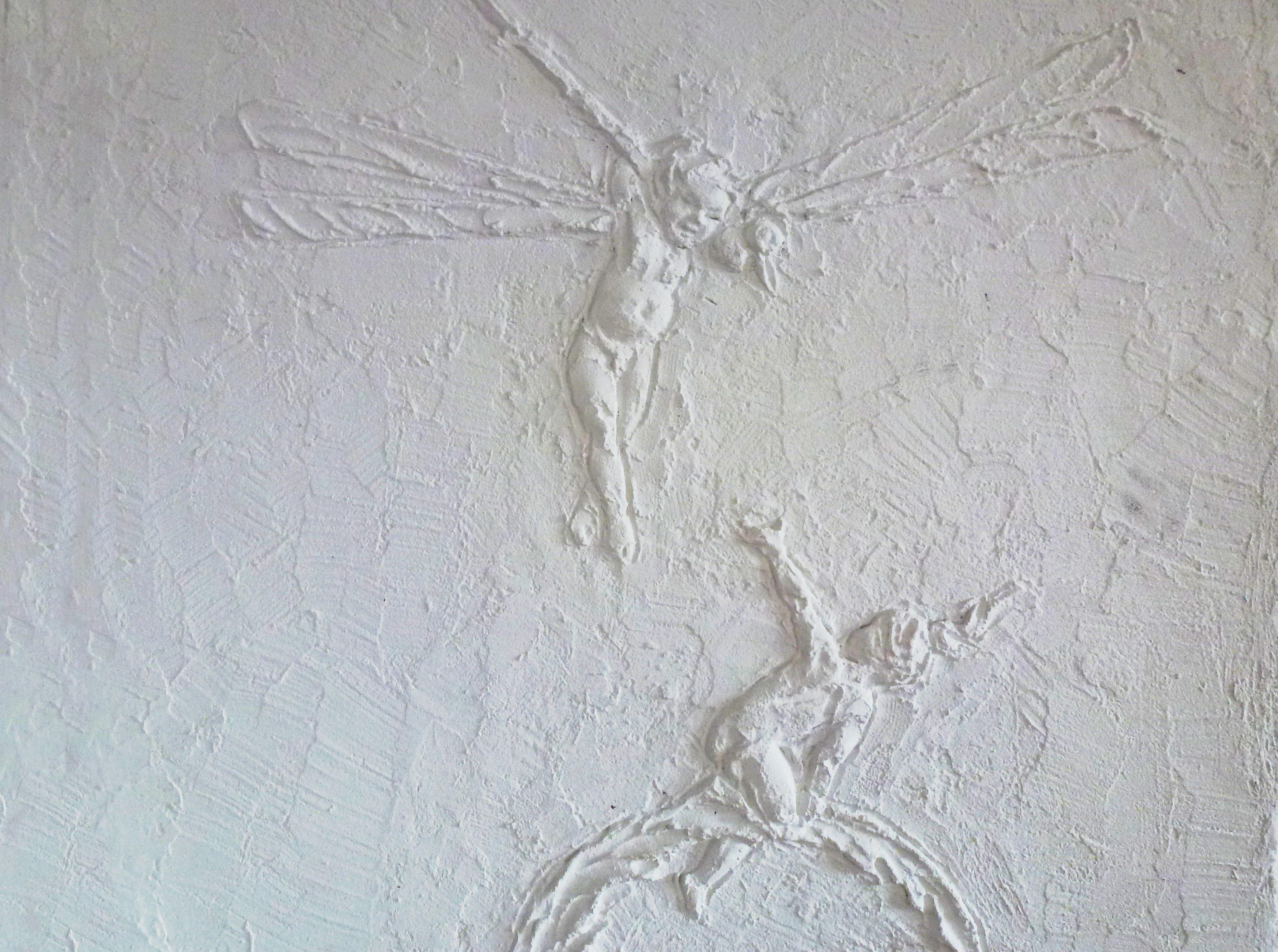 Villa Torsvi huvudbyggnad interiör